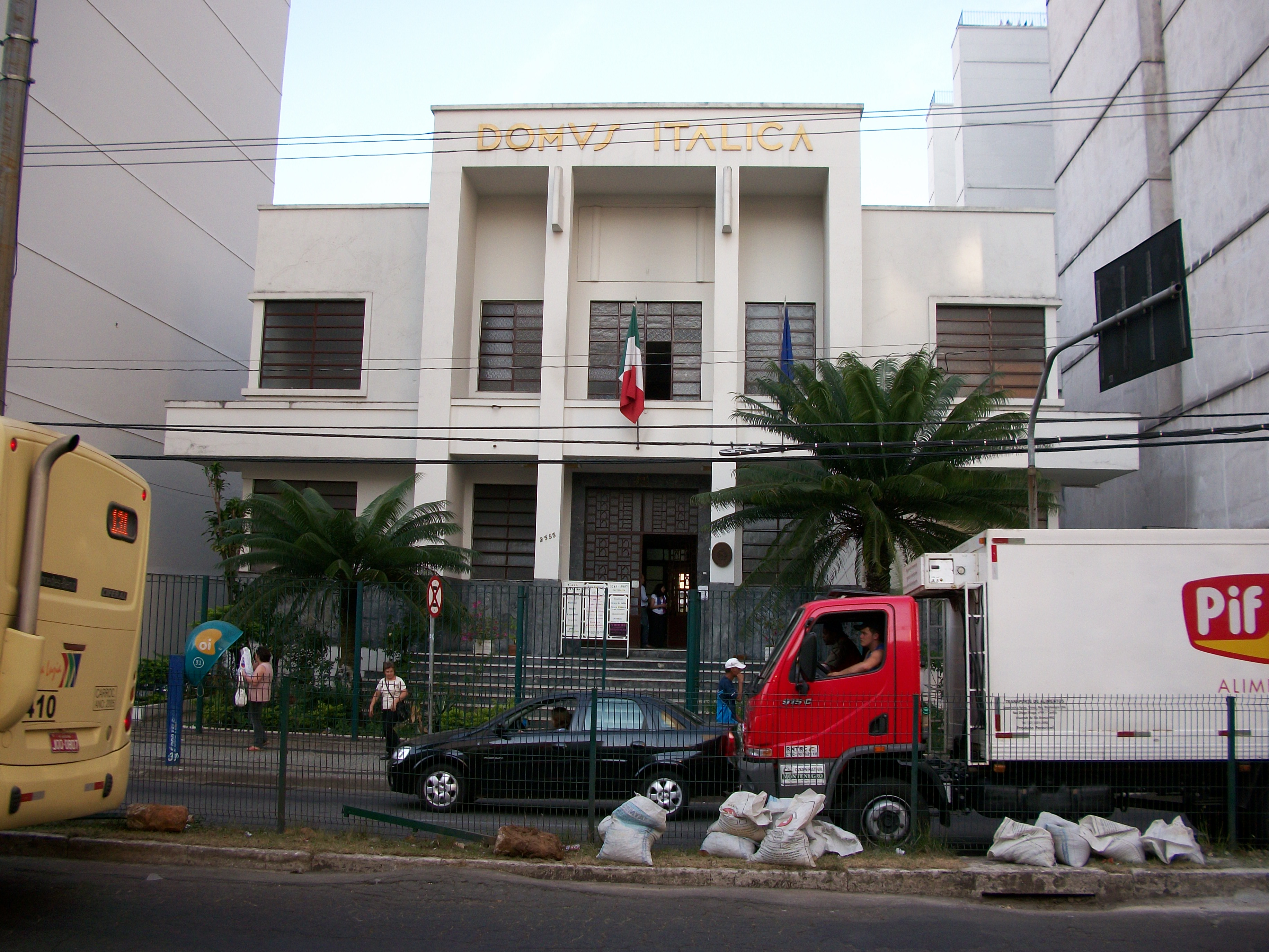 Casa da Itália em Juiz de Fora.